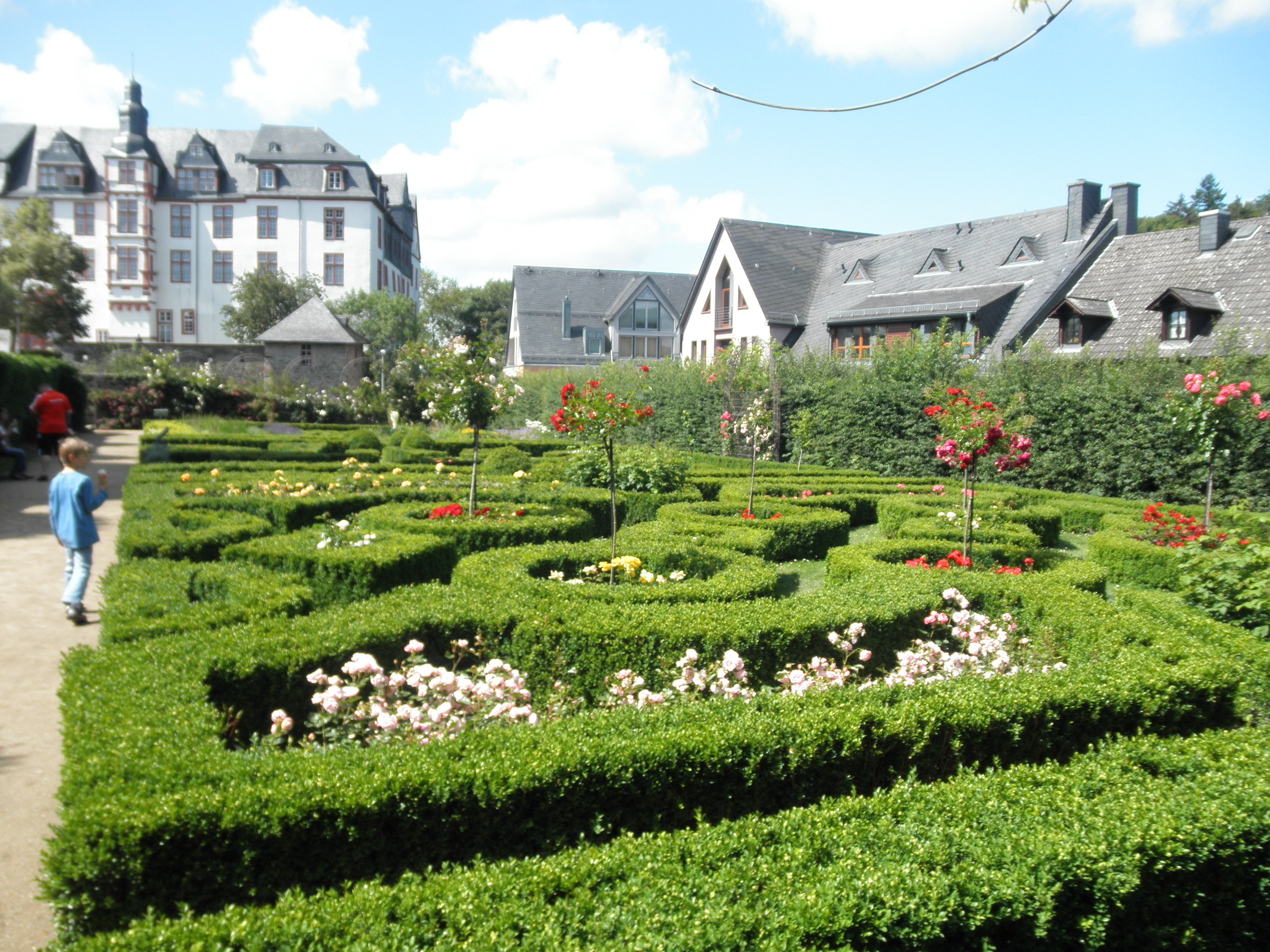 Renaissancegarten der Burg Idstein